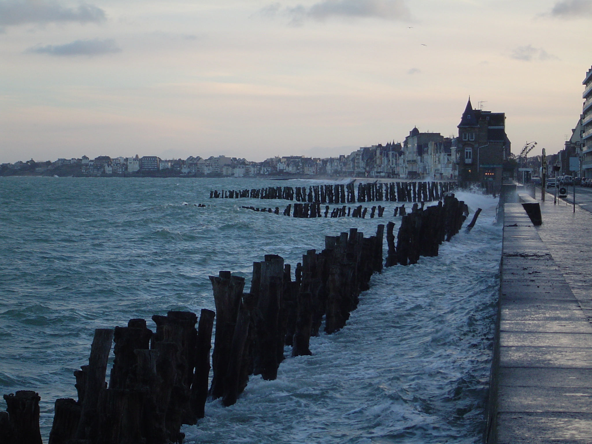 La chaussée du Sillon à Saint-Malo lors d'une marée haute de fort coefficient (106).